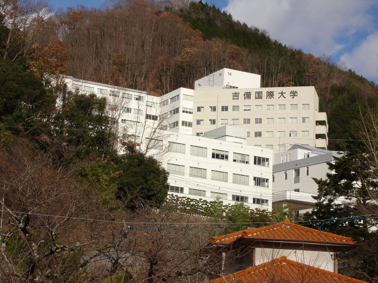 2005年12月17日撮影 吉備国際大学